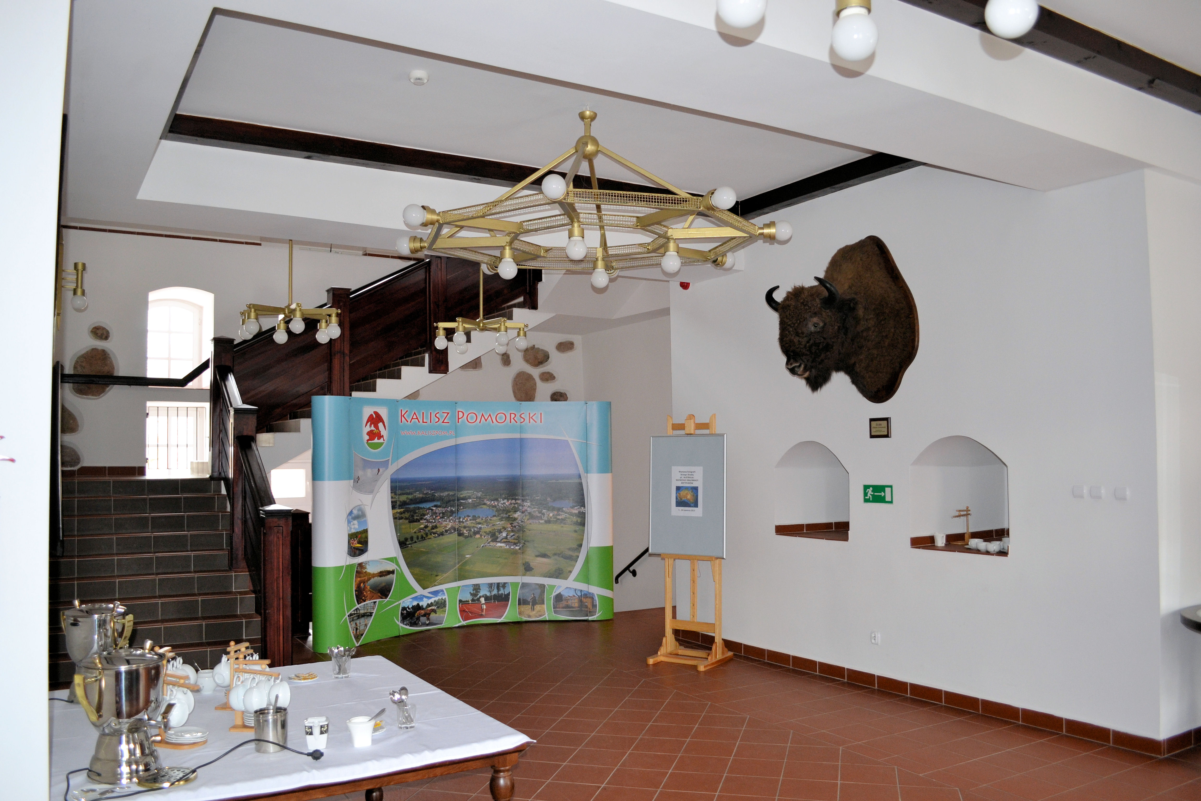 Kalisz Pomorski